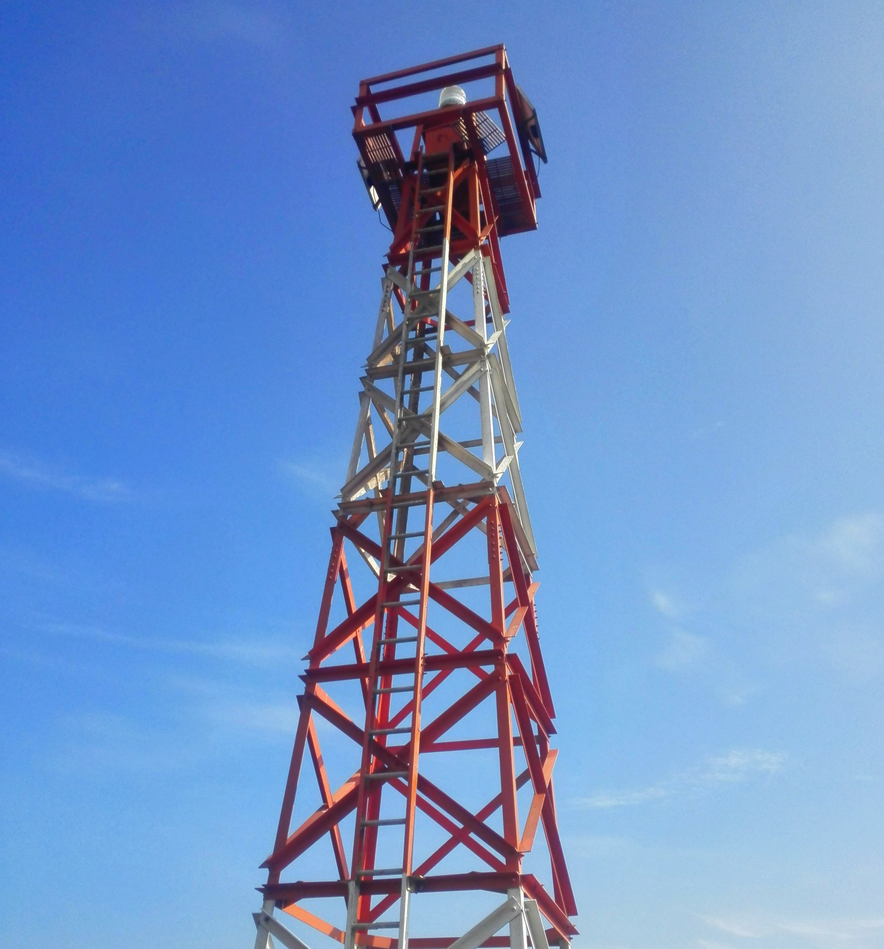 Imagen del Faro Puerto Cruz, Edo. Vargas.